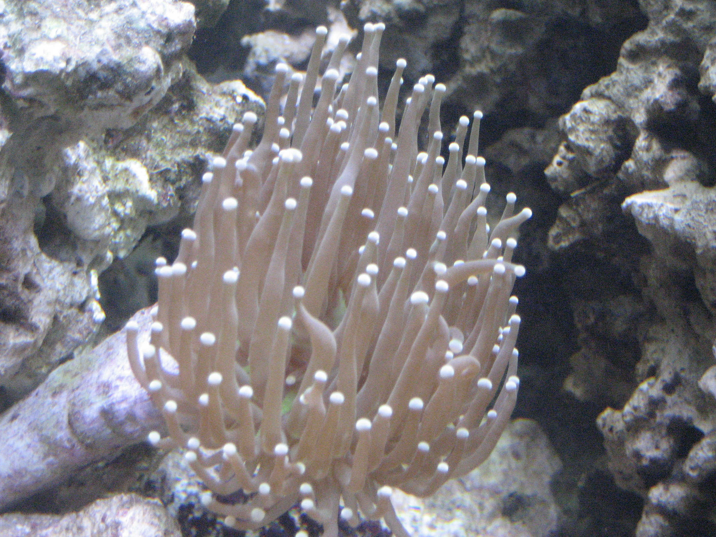 Euphyllia glabrescens, a stony coral